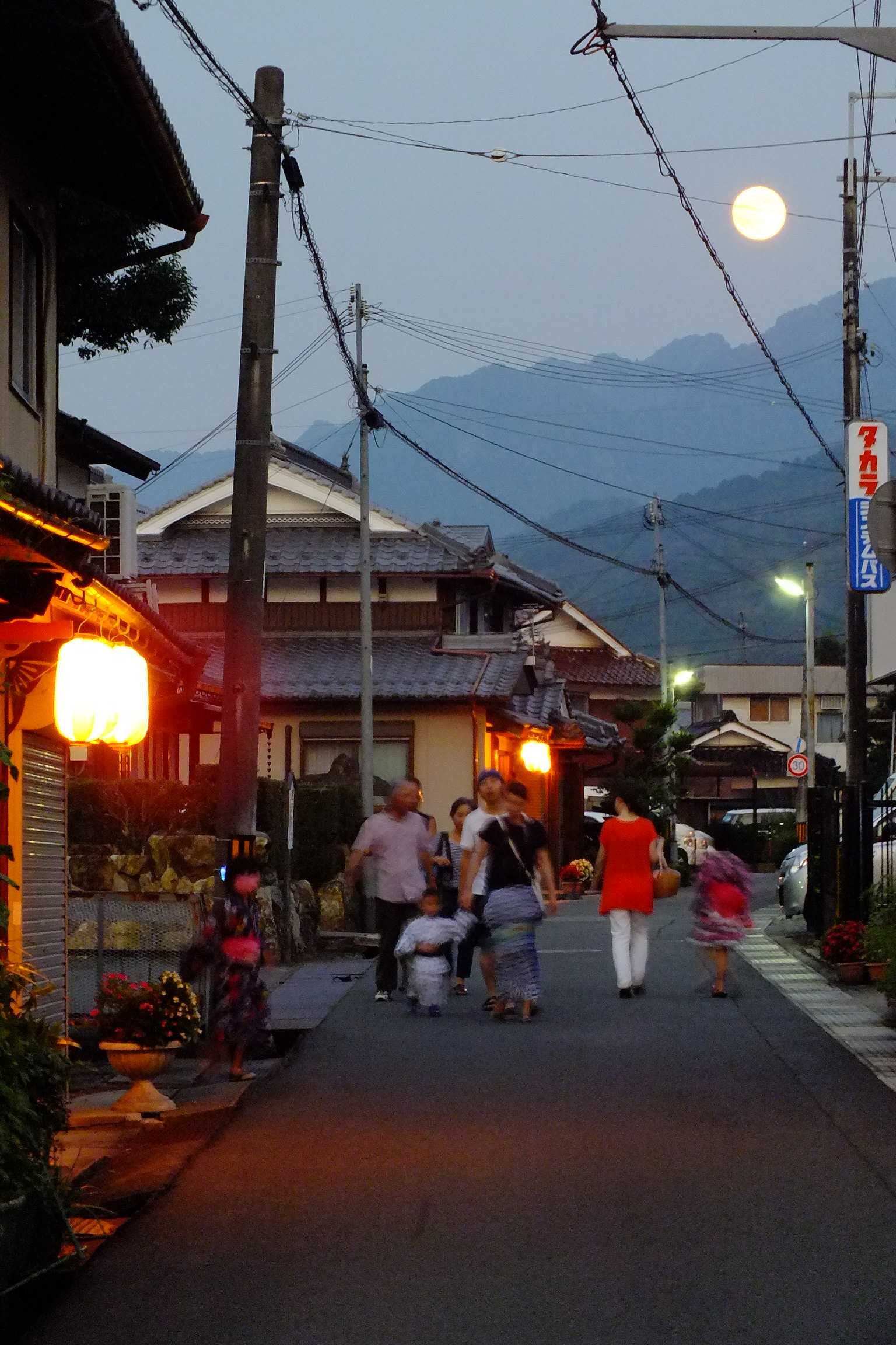 2015-07-31Minazuki-Festival Kokuryo,Tamba,Hyogo-Japan 国領水無月祭り